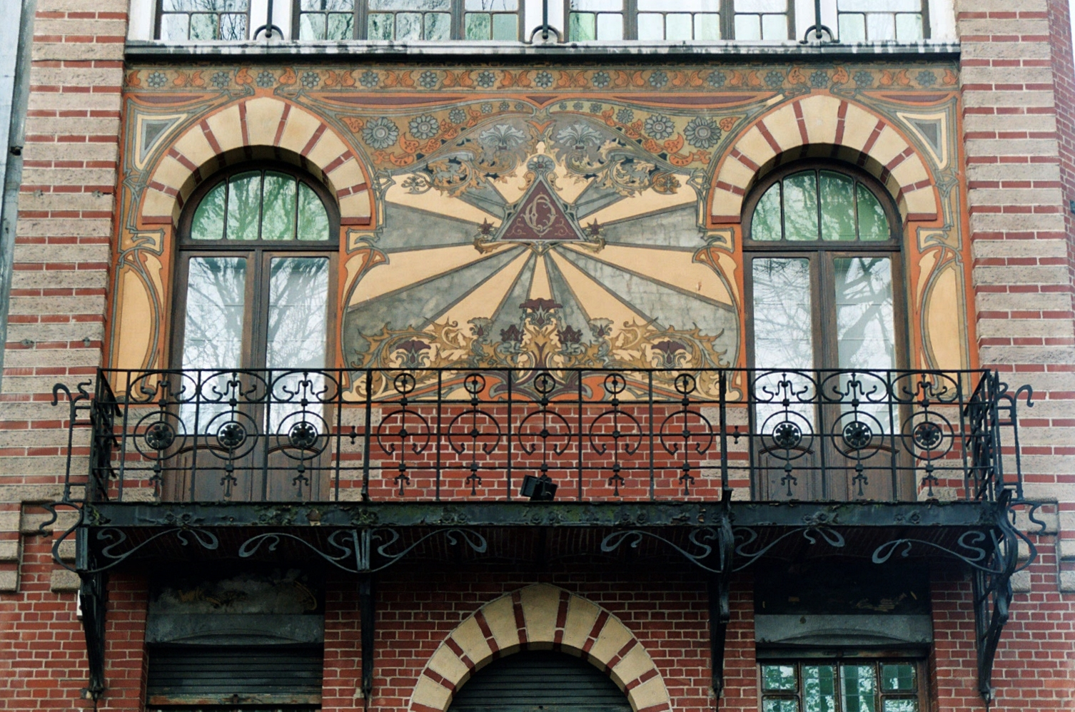 Belgique - Charleroi - Maison Dorée - Art Nouveau - sgraffite de Gabriel van Dievoet (1899)